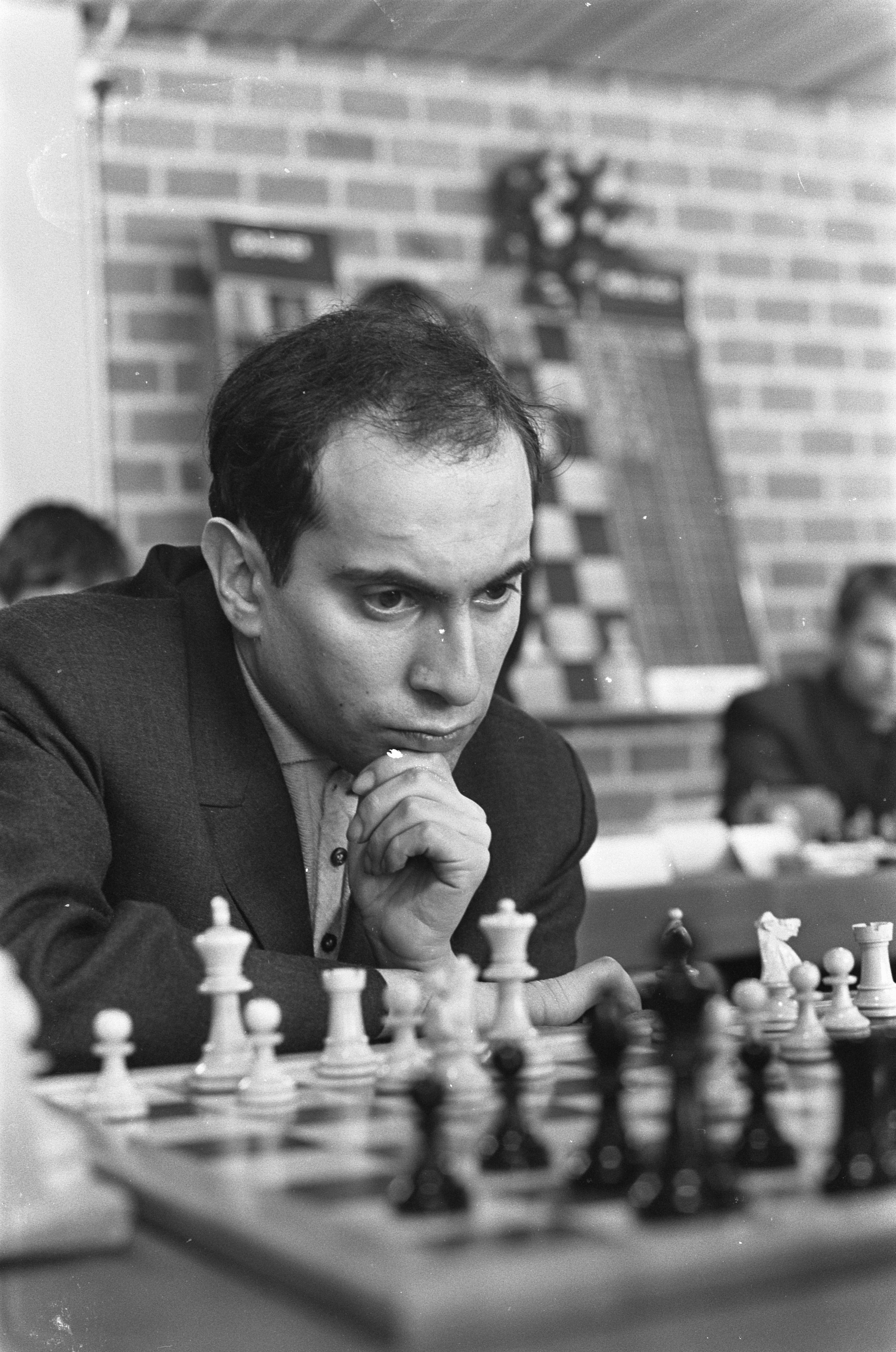 Collectie / Archief : Fotocollectie Anefo Reportage / Serie : [ onbekend ] Beschrijving : Hoogovenschaaktoernooi, de Rus M. Tal Datum : 10 januari 1968 Locatie : Rusland Trefwoorden : schaken Persoonsnaam : Tal, M. Instellingsnaam : Hoogovenschaaktoernooi Fotograaf : Kroon, Ron / Anefo Auteursrechthebbende : Nationaal Archief Materiaalsoort : Negatief (zwart/wit) Nummer archiefinventaris : bekijk toegang 2.24.01.05 Bestanddeelnummer : 920-9788